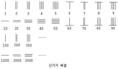 이 그림은 산가지 배열을 나타낸 그림입니다